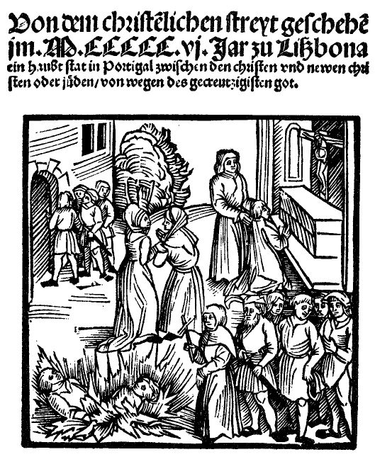 Titelblatt einer Flugschrift zum Massaker an Neuchristen in Lissabon im Jahr 1506